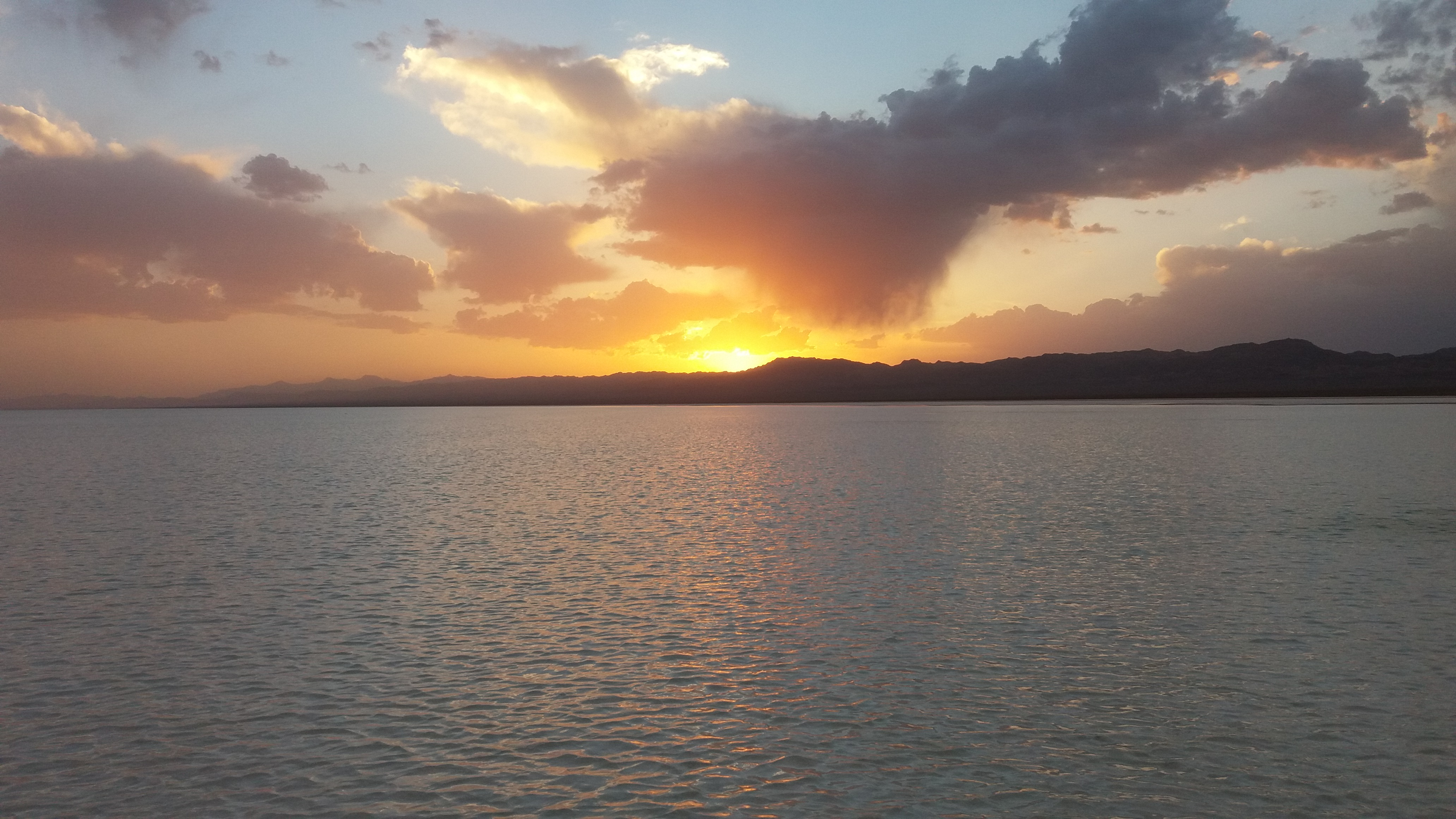 دریاچه کویر نمک بردسکن